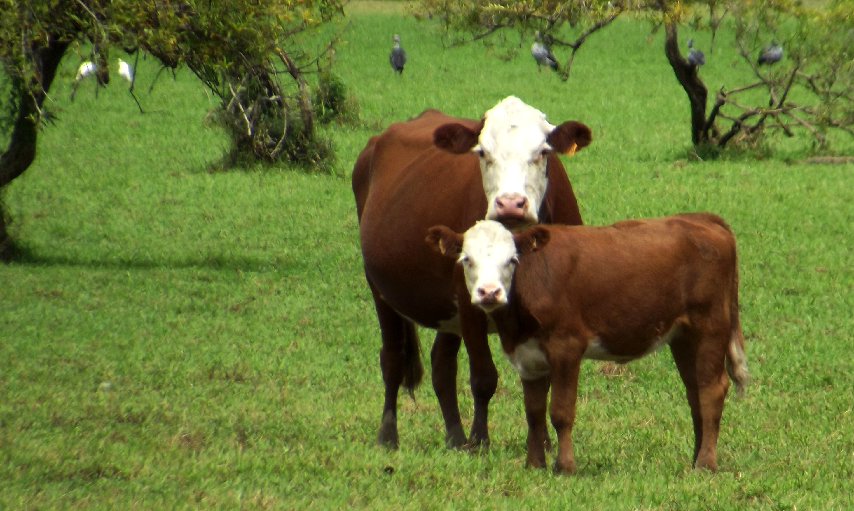 Madre e hija